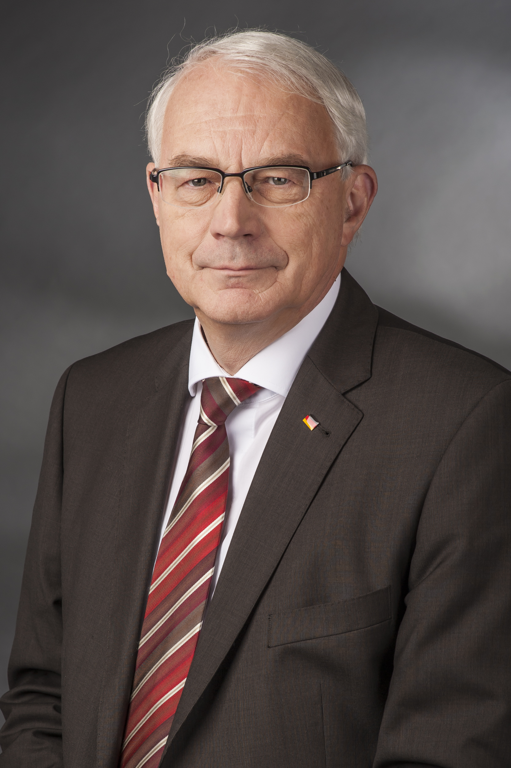 Günter Baumann (* 1. August 1947 in Annaberg-Buchholz) ist ein deutscher Politiker (CDU) und seit 2005 Vorsitzender der Arbeitsgruppe Petitionen der CDU/CSU-Bundestagsfraktion.